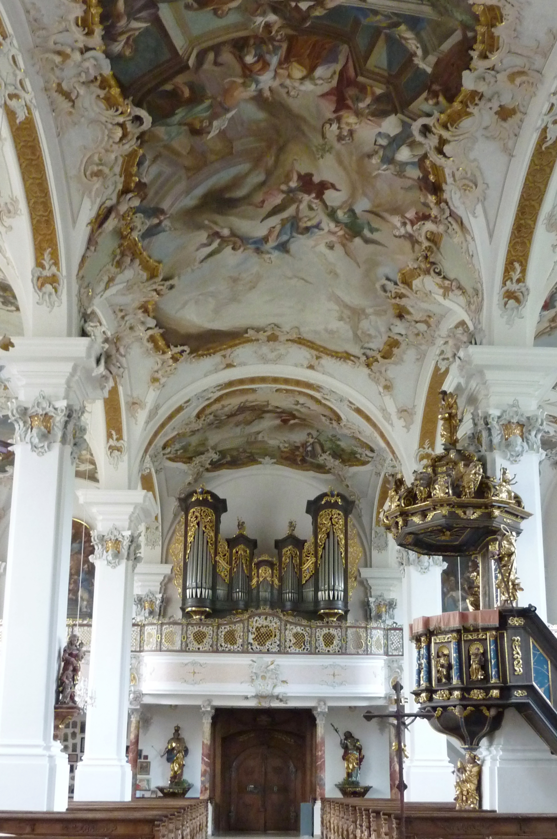 Pfarr- und Wallfahrtskirche St. Michael in Violau (Altenmünster), Innenansicht mit Blick zur Orgelempore